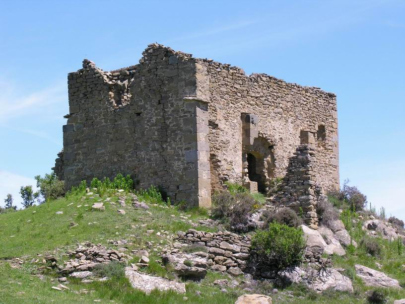 Caldearenas, Alto Gállego